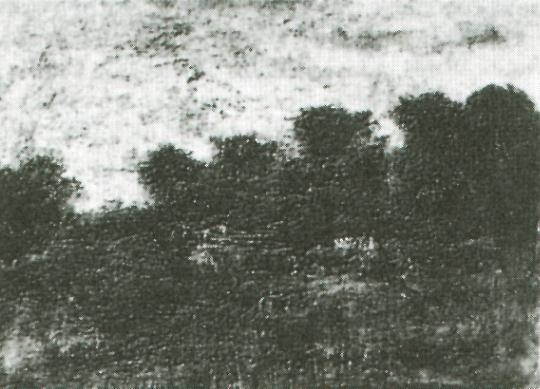 Pintura estancia en La Haya